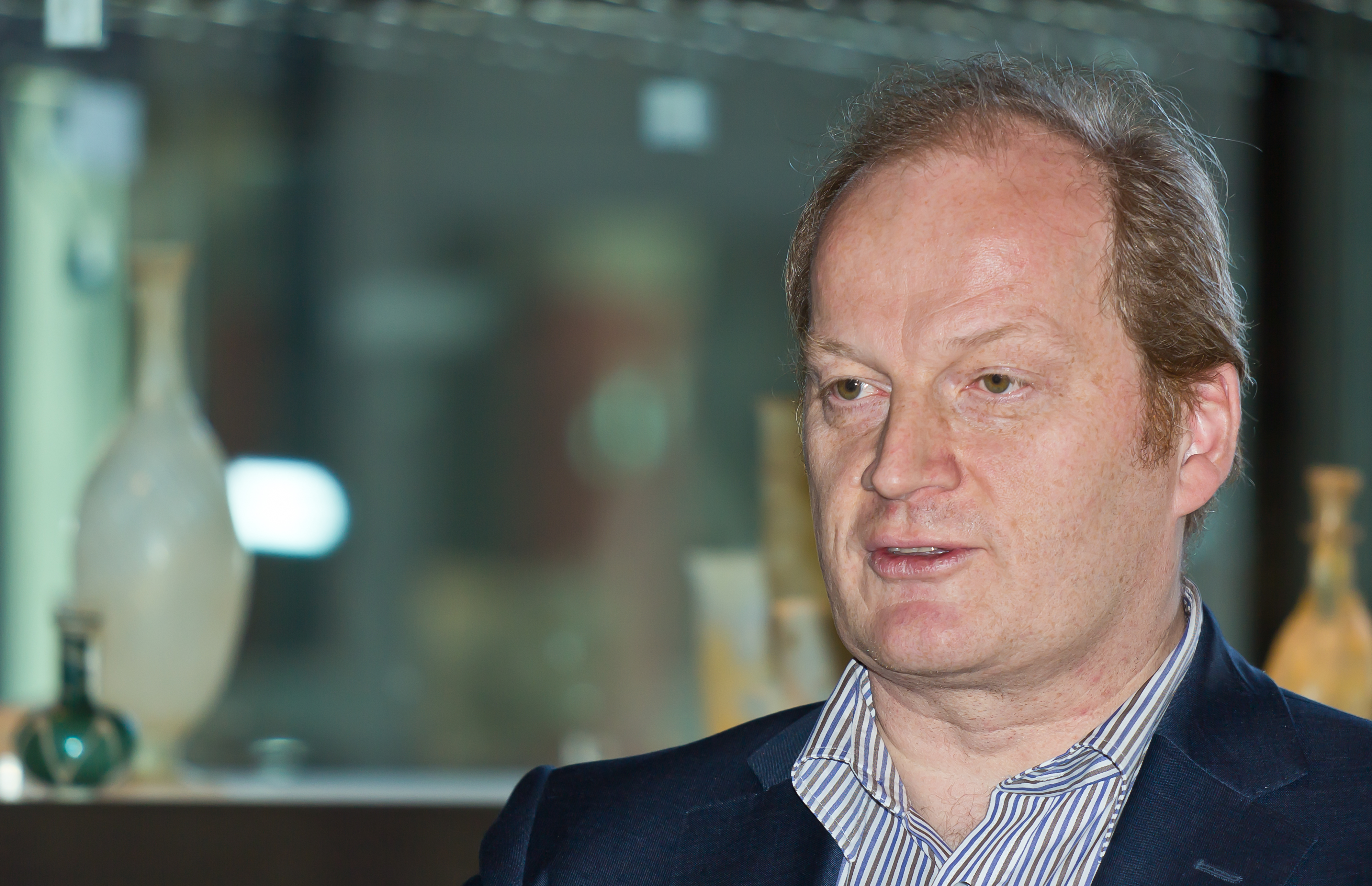 Pressegespräch im Römisch-Germanischen Museum Köln (RGM). Direktor Marcus Trier stellt Fundstücke vor, die bei den Ausgrabungen durch das Amt für Archäologische Bodendenkmalpflege im Opernquartier Köln gefunden wurden. Foto: Marcus Trier